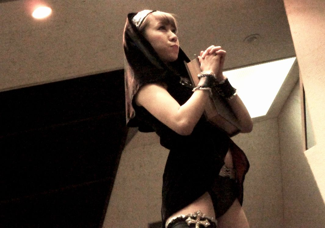 2018年1月7日大阪にて